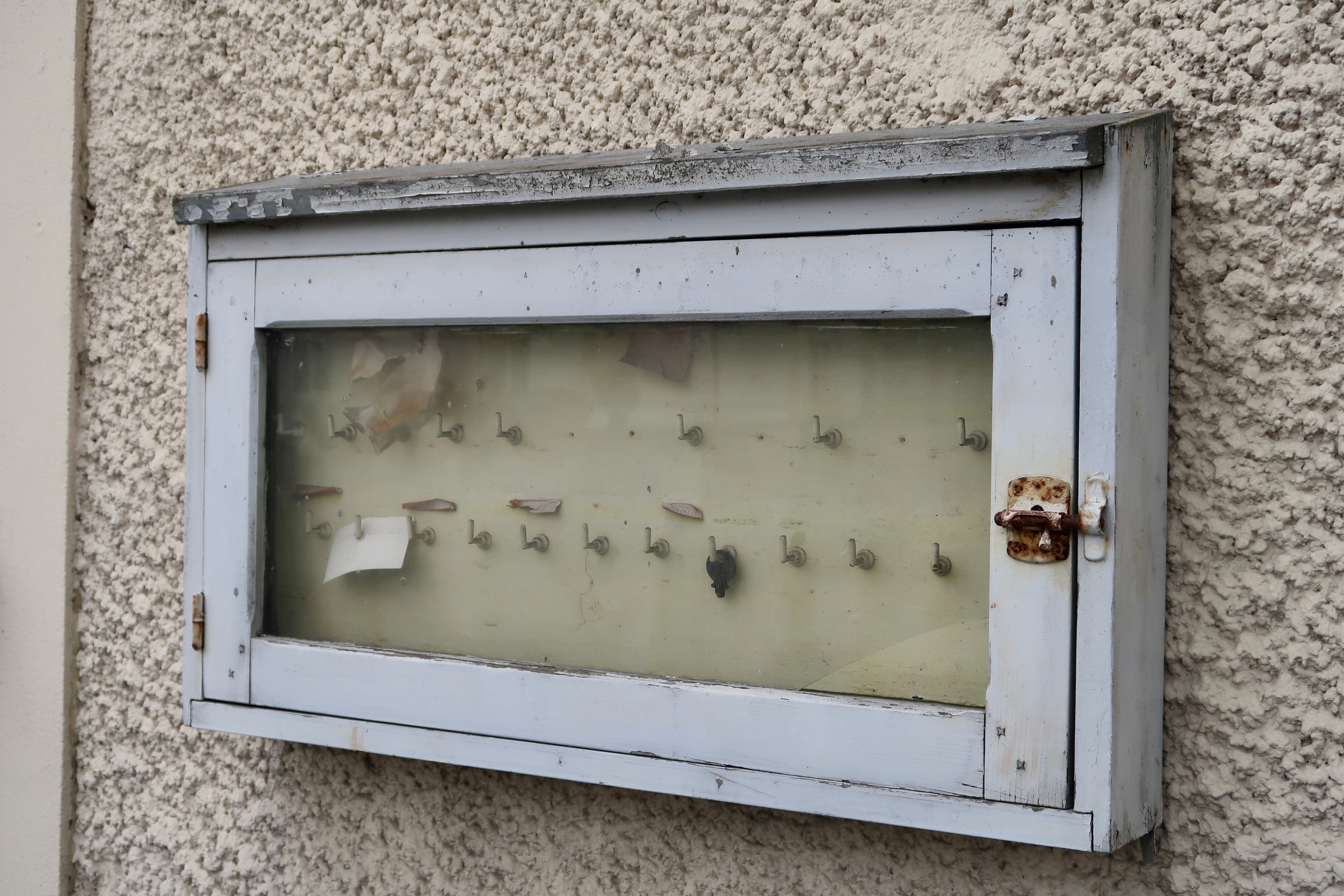 Ancienne boîte à clefs sur la guérite, qui devait permettre d'ouvrir les chapelles du cimetière Carnot à Suresnes (Hauts-de-Seine).